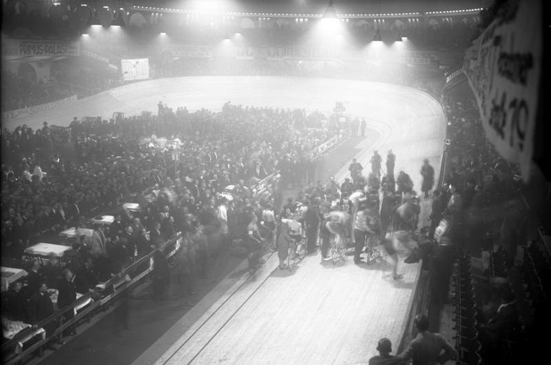 Der Start zum 27. Berliner Sechstagerennen ! Blick in den Sportpalast kurz vor dem Start.